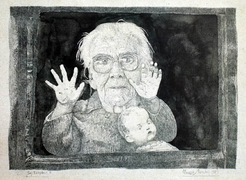 Das Fenster, 1983, Bleistift, Aquarell auf Papier, 13 x 18,5 cm